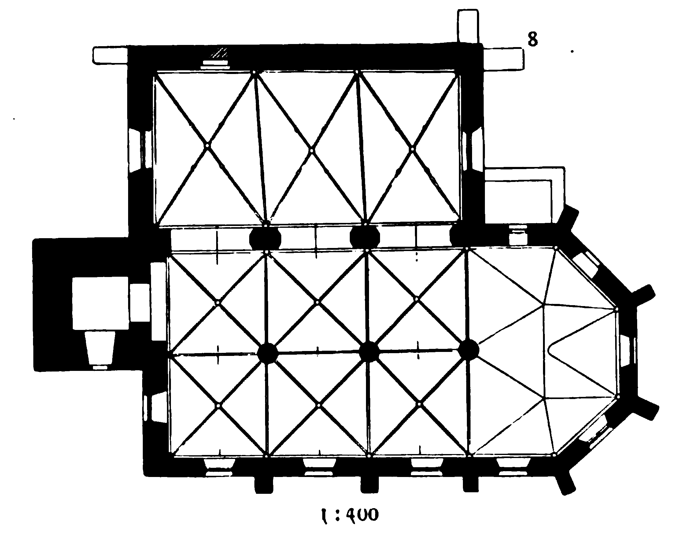 Grundriss der Ev. Kirche in Levern, Gemeinde Stemwede